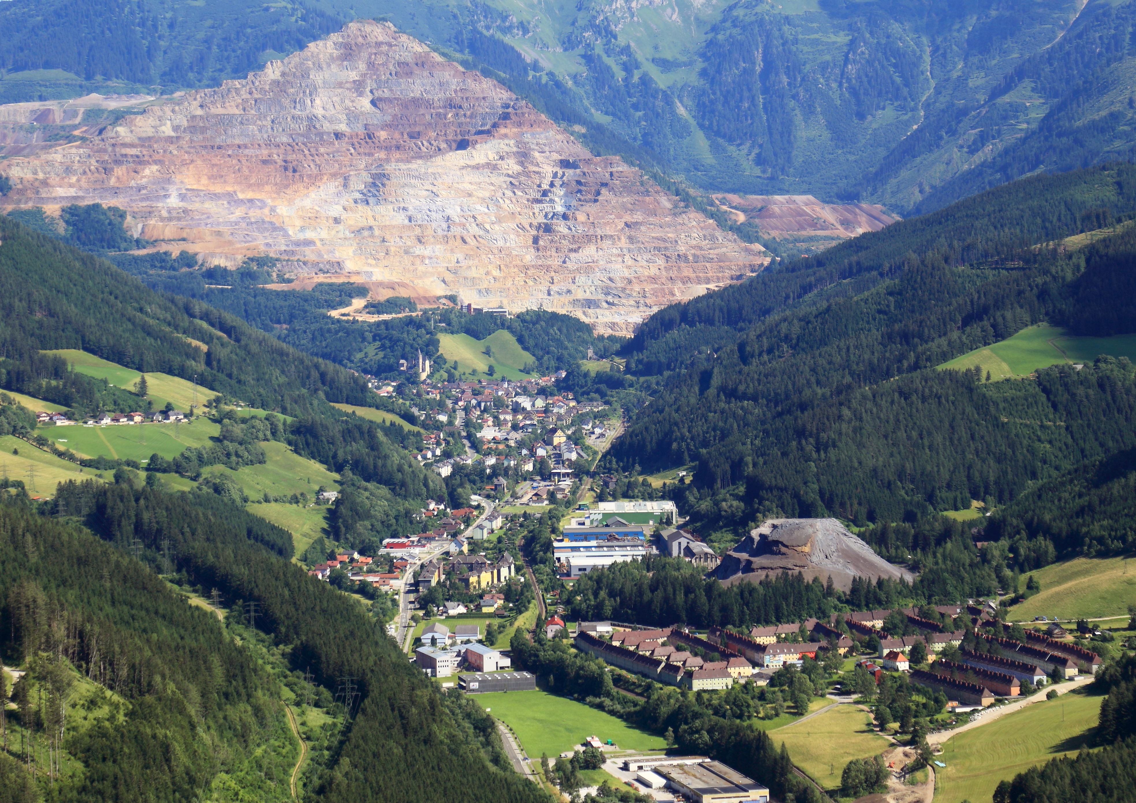 Nordwestansicht der österreichischen Stadt Eisenerz im steirischen Bezirk Leoben mit dem Erzberg im Hintergrund.